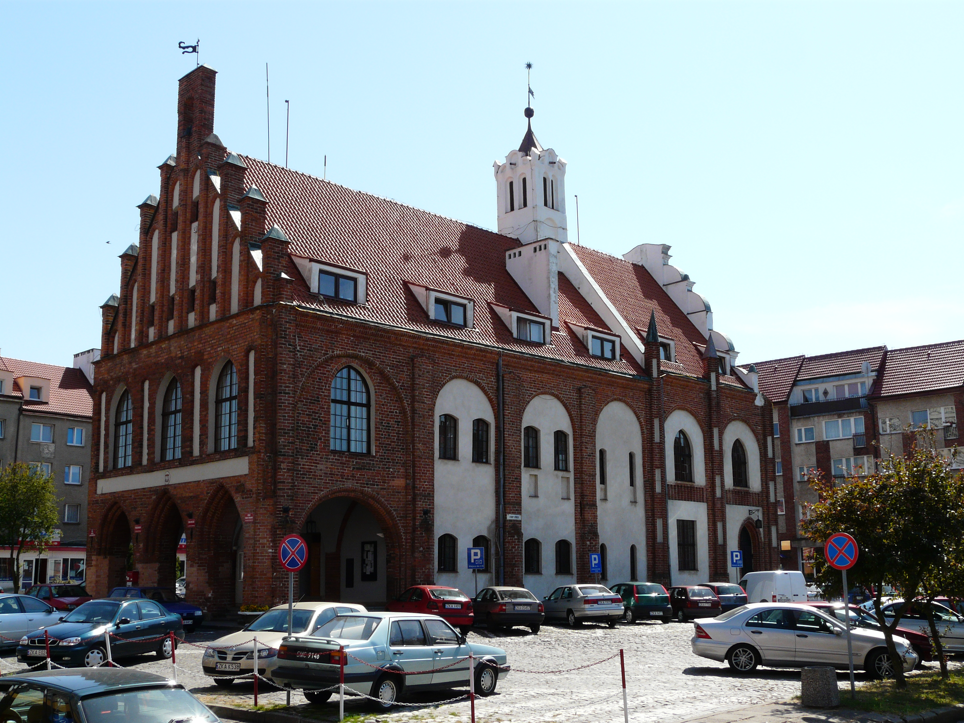 Radnice v Kamienu Pomorskiem, Západopomořanské vojvodství, Polsko